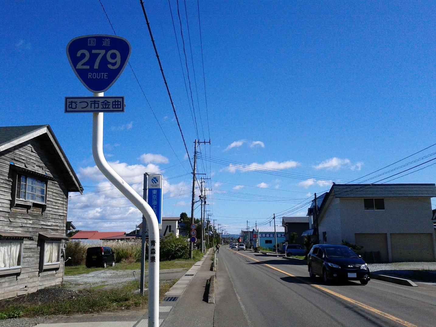 むつ市金曲付近の国道279号。